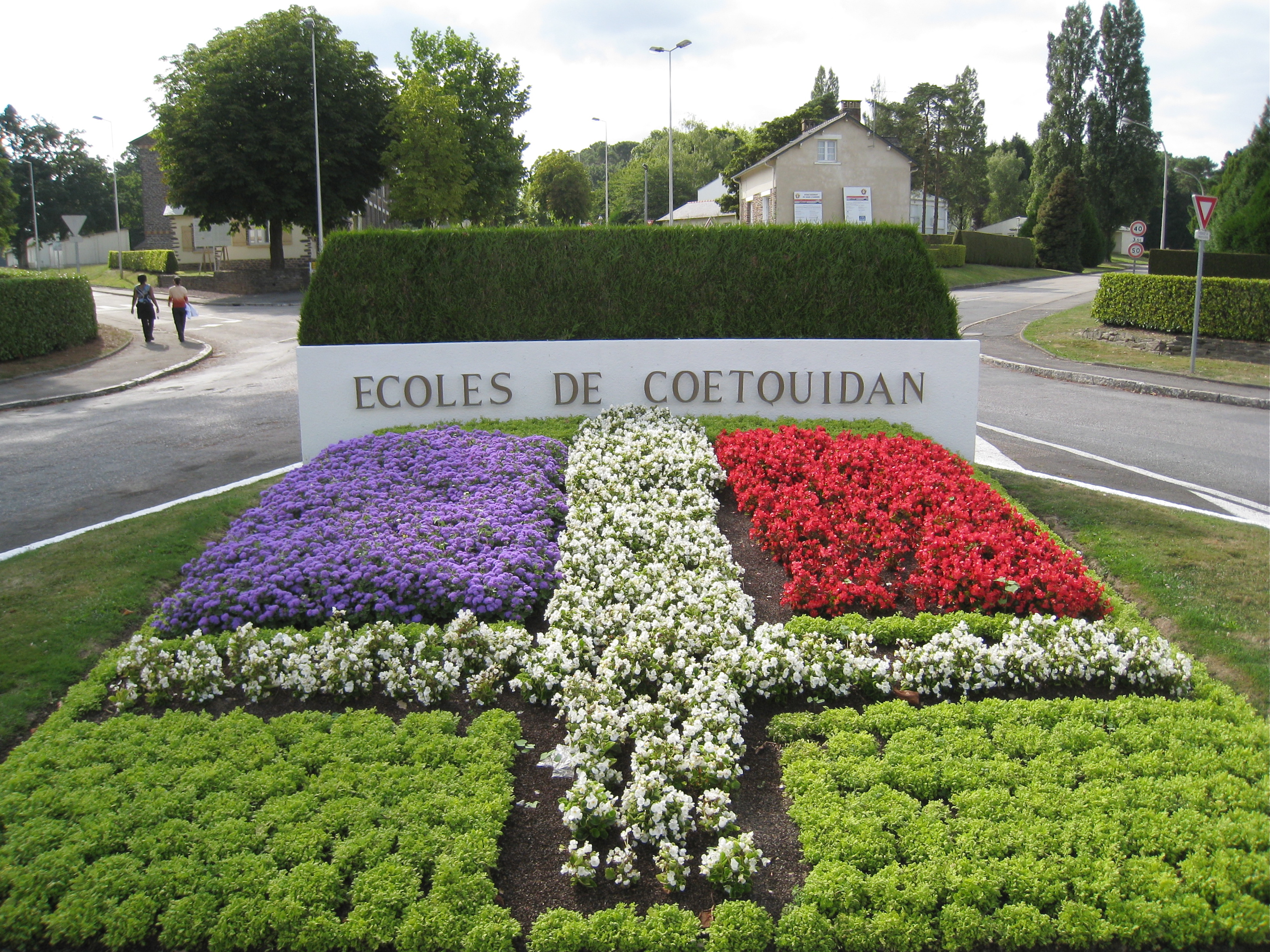 Parterre de fleurs à l'entrée des Ecoles de Coëtquidan, Morbihan